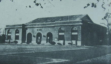 1937年金陵大学附属中学体育馆。